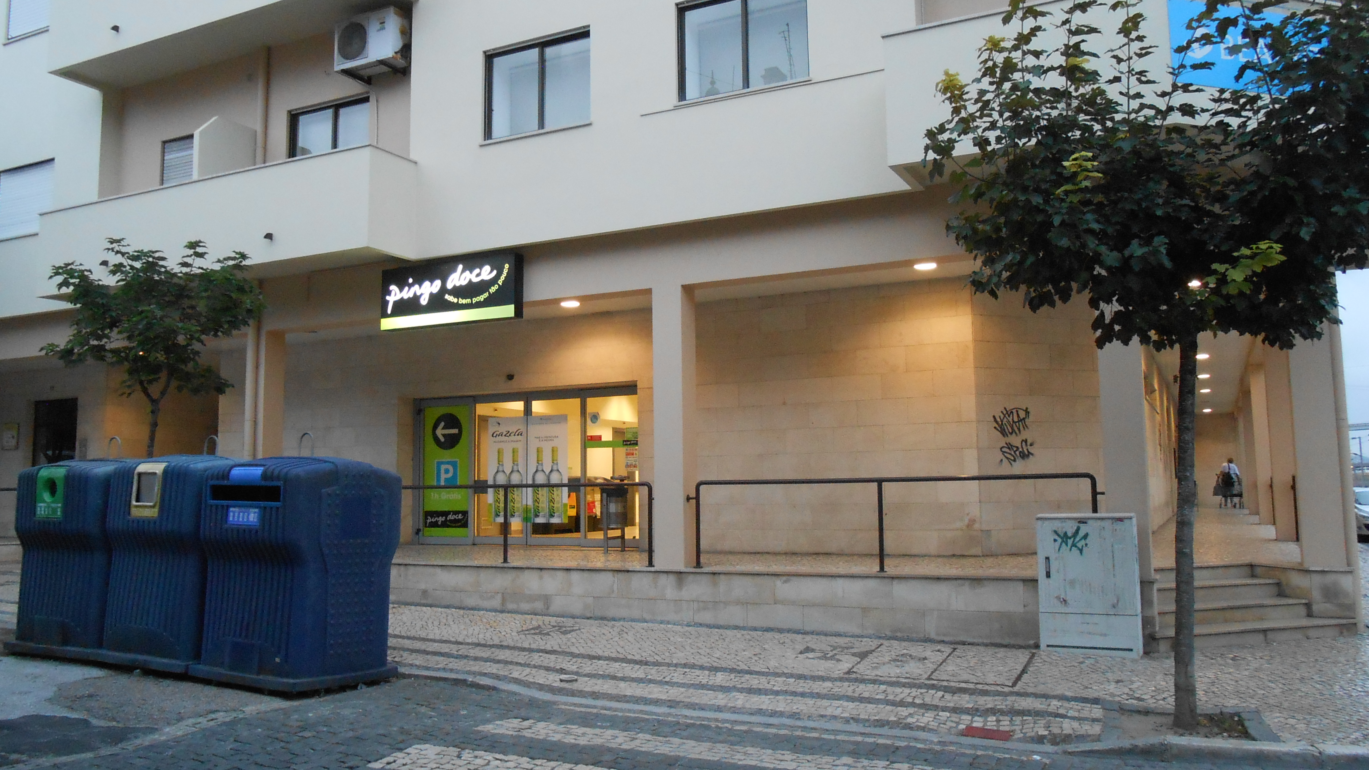 Pingo Doce-Supermarkt in Figueira da Foz am Abend.